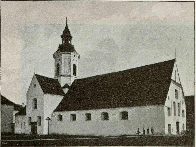 Nekdanja samostanska, sedaj župna cerkev v Zatičini.